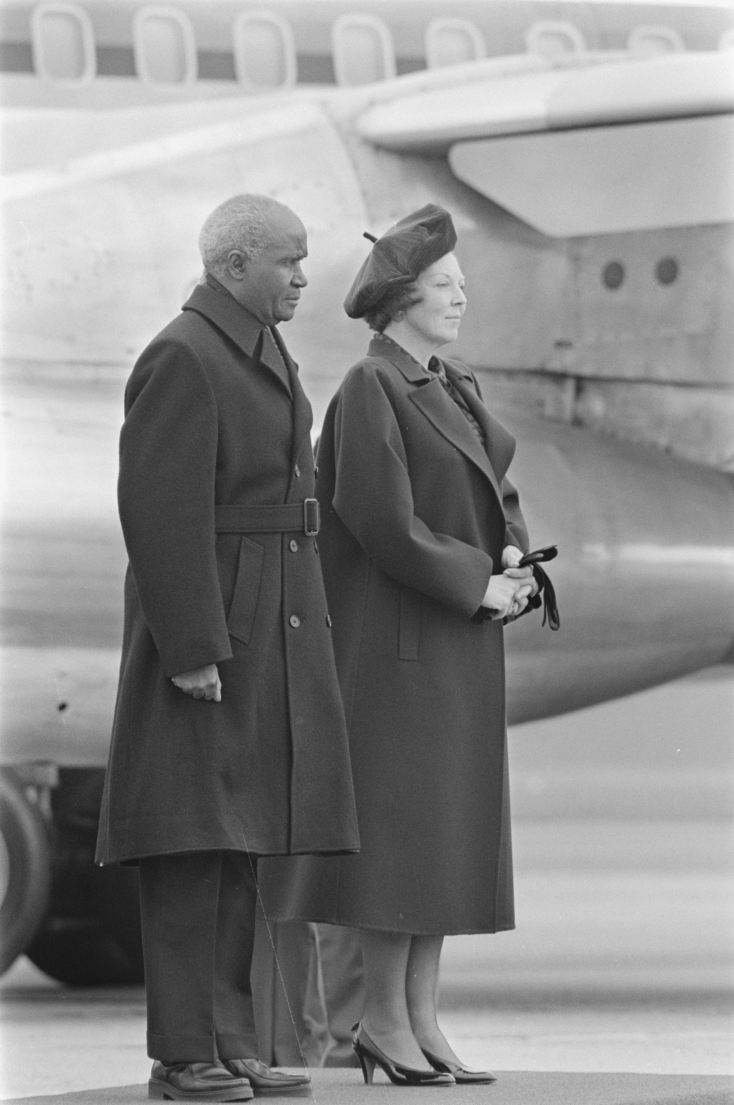 Ontvangst van president Kaunda van Zambia op vliegveld Zestienhoven (Rotterdam NL) door Koningin Beatrix. 13 april 1986